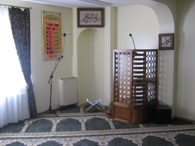 Sala modlitewna w poznańskim meczecie